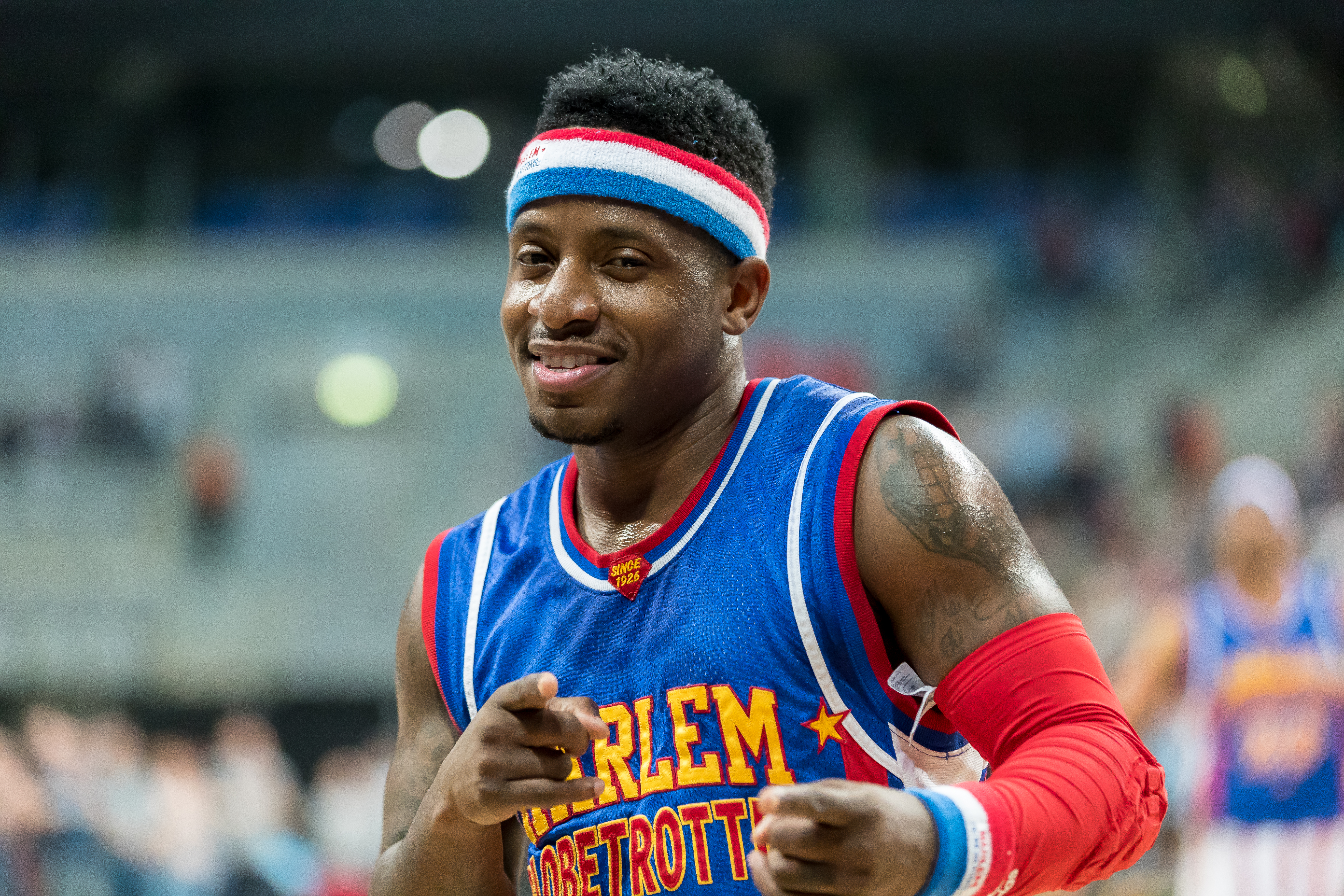 Harlem Globetrotters during Harlem Globetrotters at SAP Arena, Mannheim, Baden-Württemberg, Germany on 2017-03-27, Photo: Sven Mandel